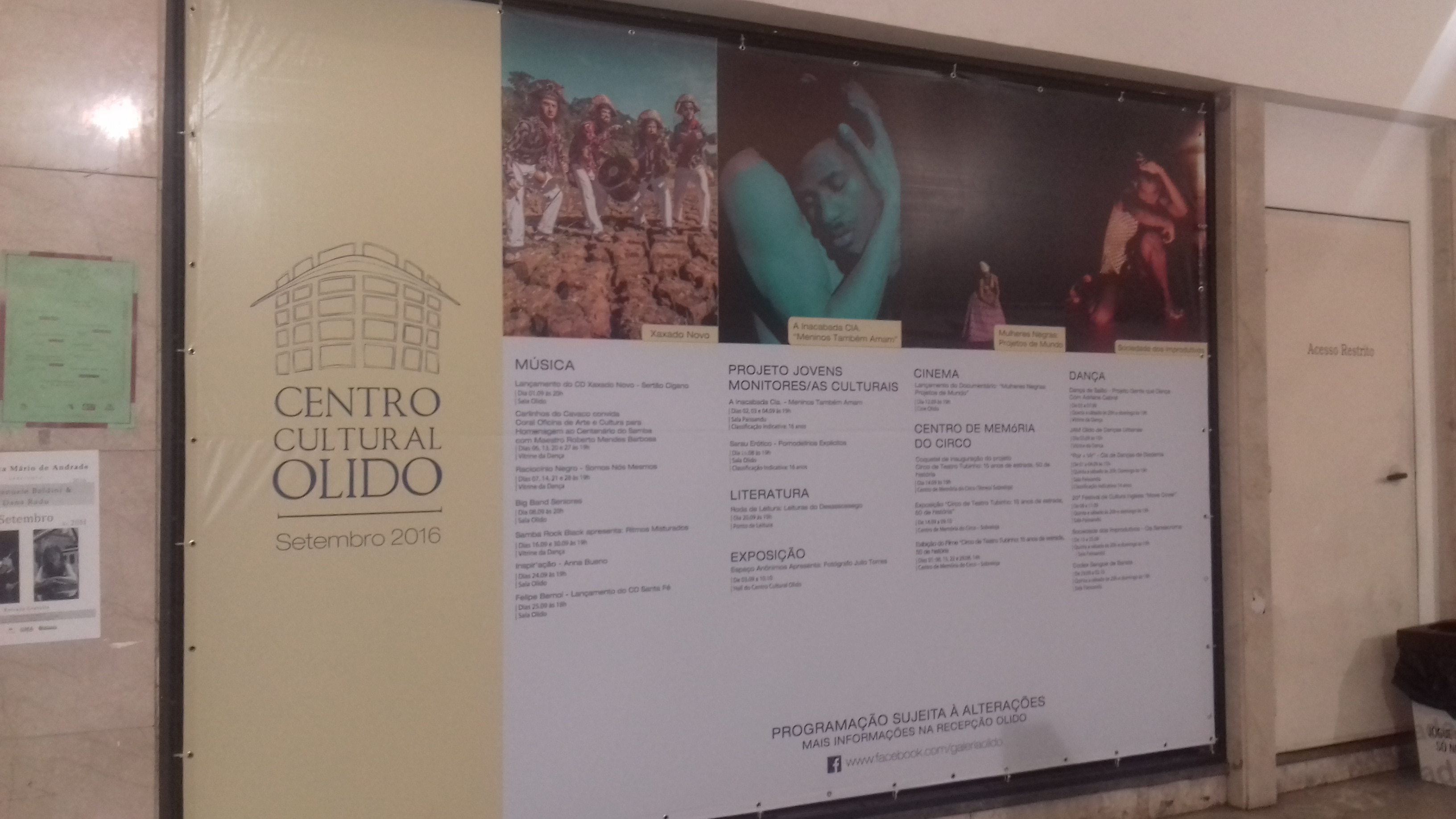 Programação da Sala Olido.